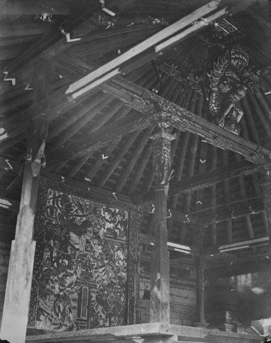 Foto. Interieur van een balé, met een beschilderd bord (barba) voorstellend een episode uit een hindoeïstisch heldendicht